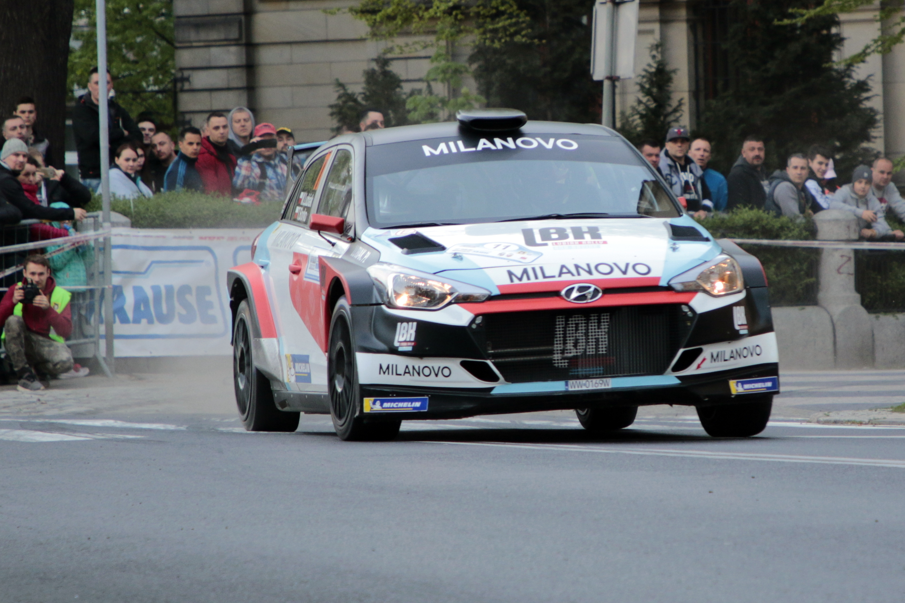 Rajd Świdnicki 2019 - Maciej Lubiak